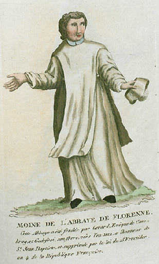 Collection de costumes de tous les ordres monastiques, supprimés à differentes époques, dans la ci-devant Belgique, Bruxelles, Philippe Joseph Maillart et sœur, 1811